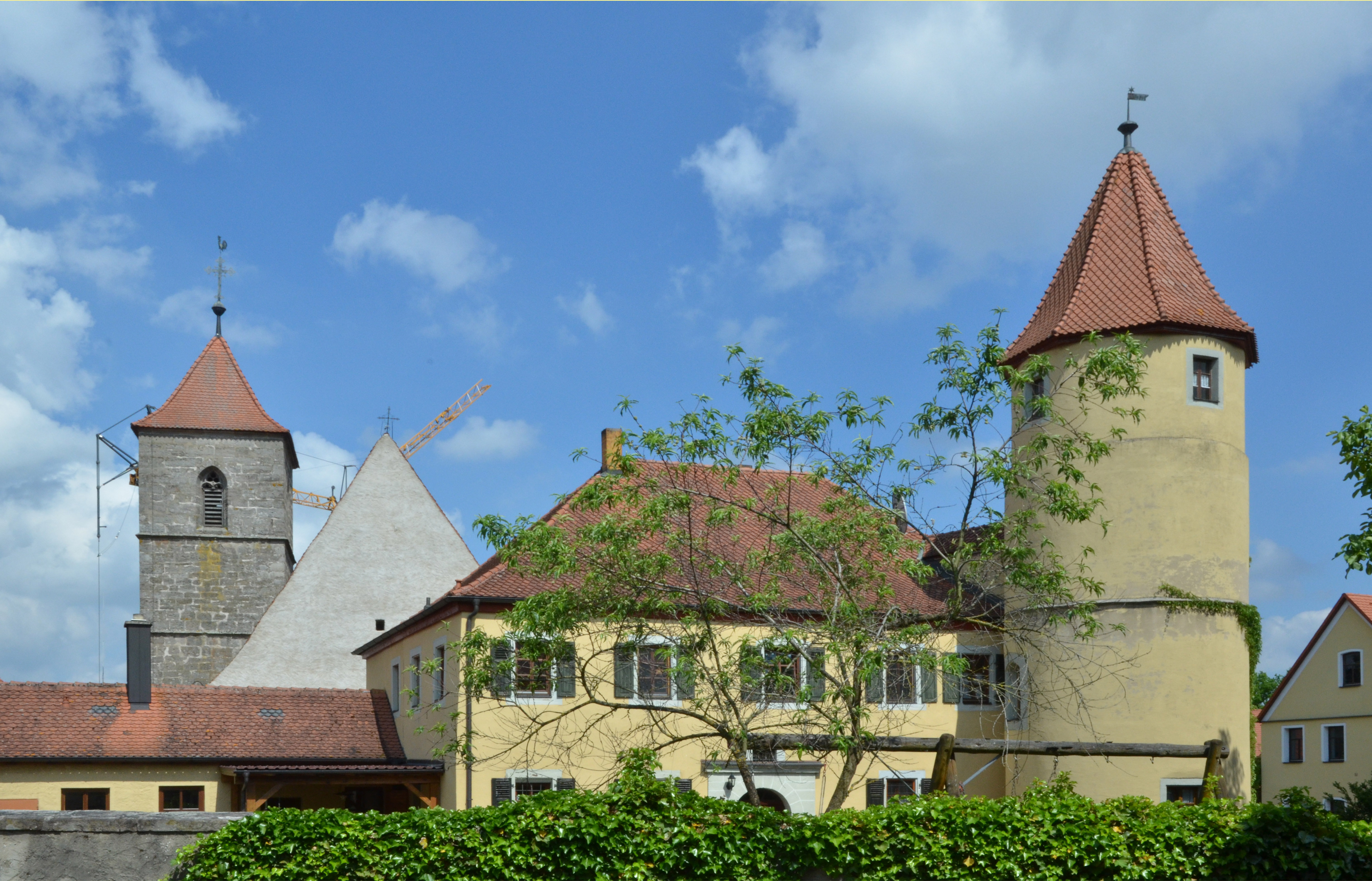 Unteraltenbernheim Ehem. Seckendorffsches Schloss